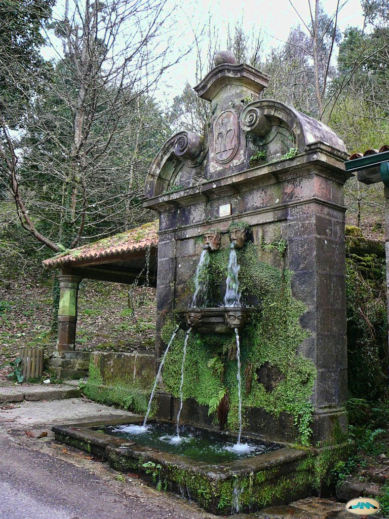 Pontevedra, Pazo de Lourizán